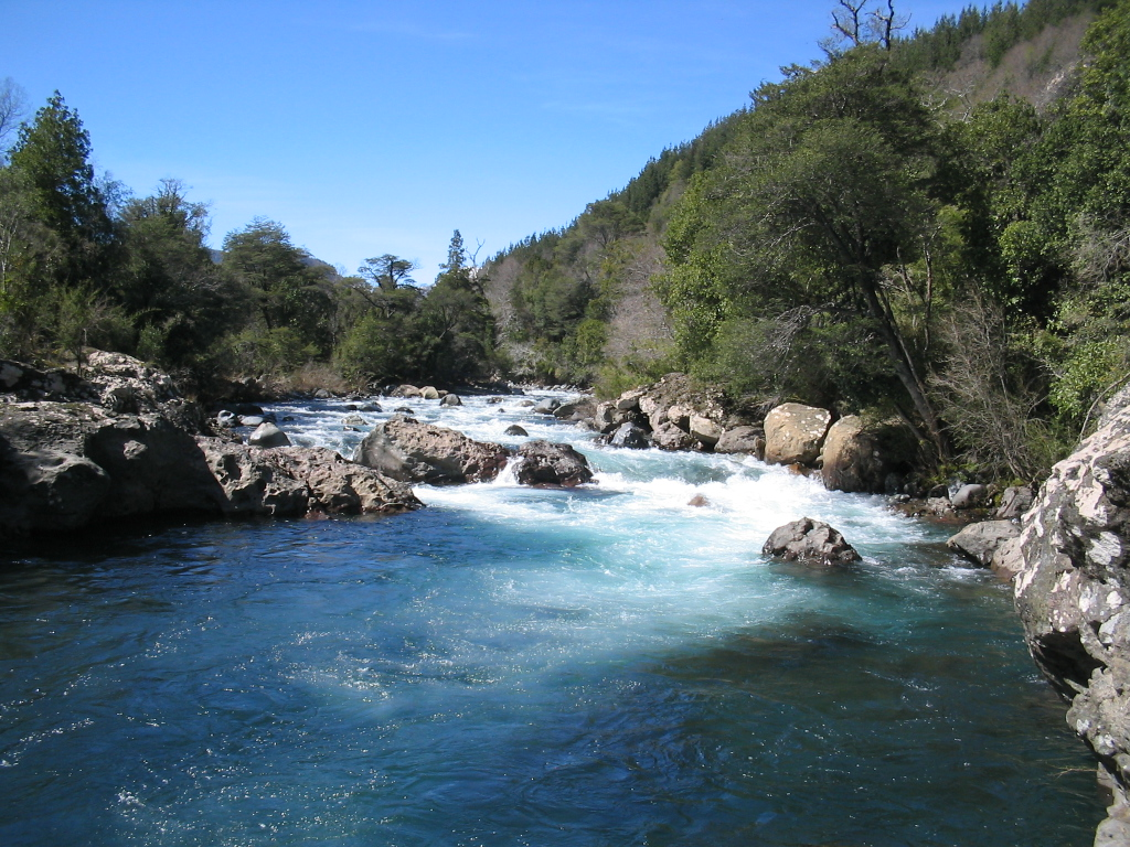 Río Chillán en los Pellines